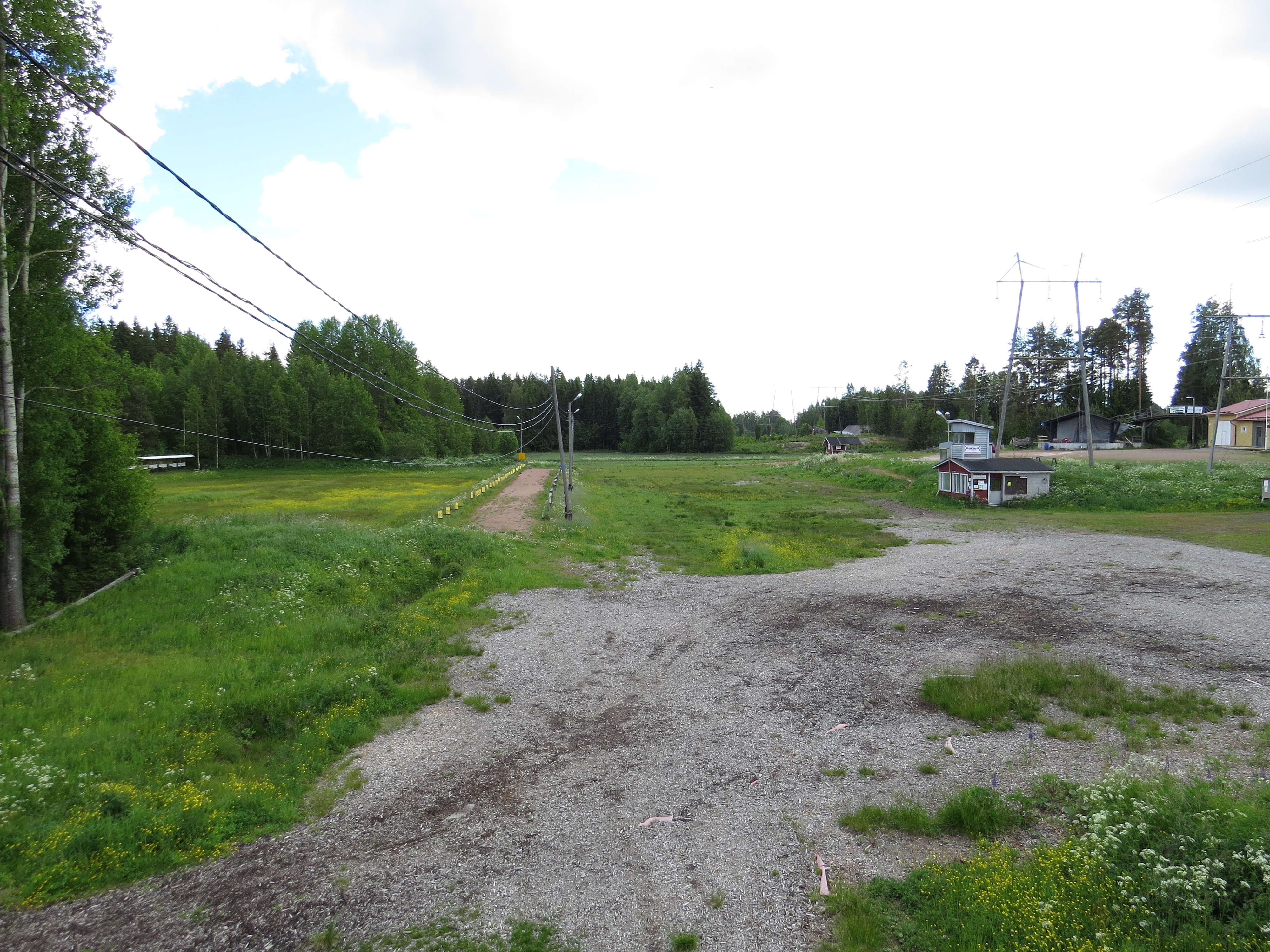 Kymin Koskenpoikien hiihtostadionin aluetta Laajakoskella Kotkassa.